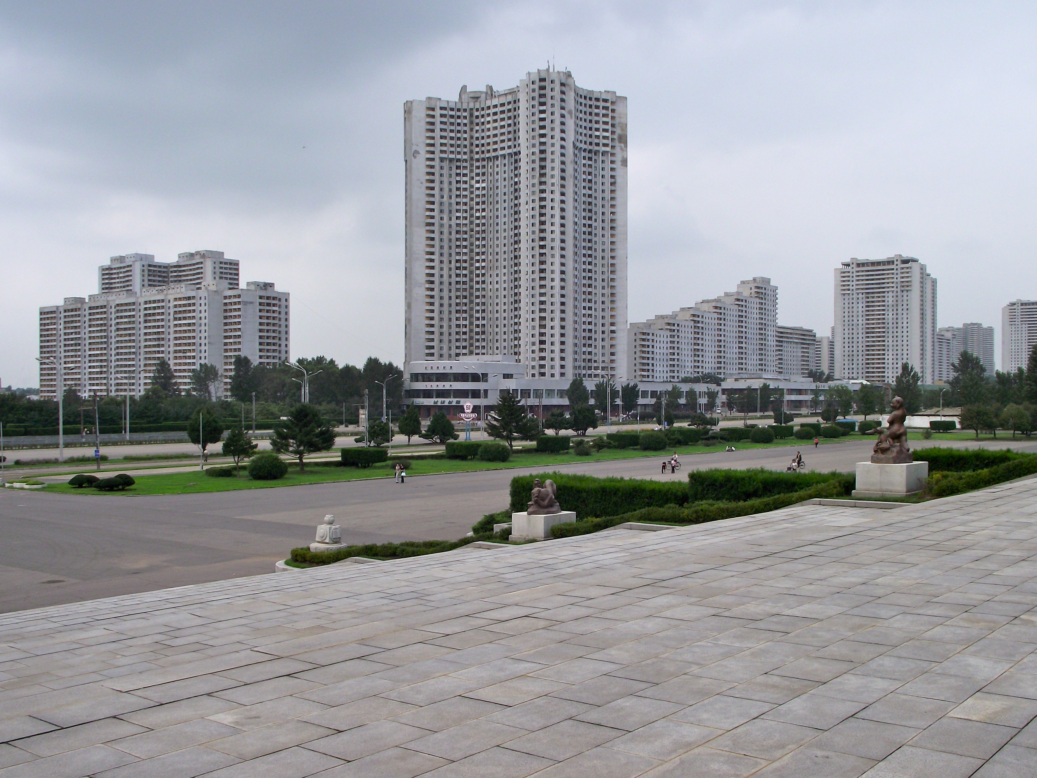 Buildings in Kwangbok-Street